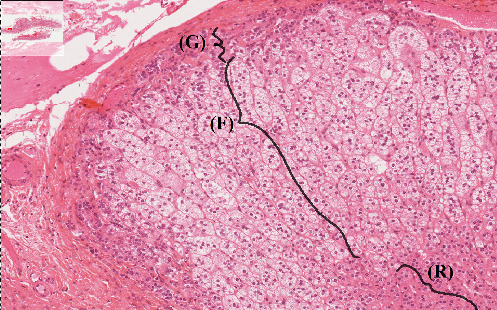 On peux observé les différentes zones. Image sur laquelle j'ai travaillé est issue du site